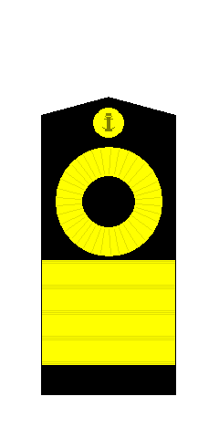 Insignia yang digunakan pada bahu Komodor Tentera Laut British, Australia, New Zealand, India, Pakistan dan Sri Lanka.